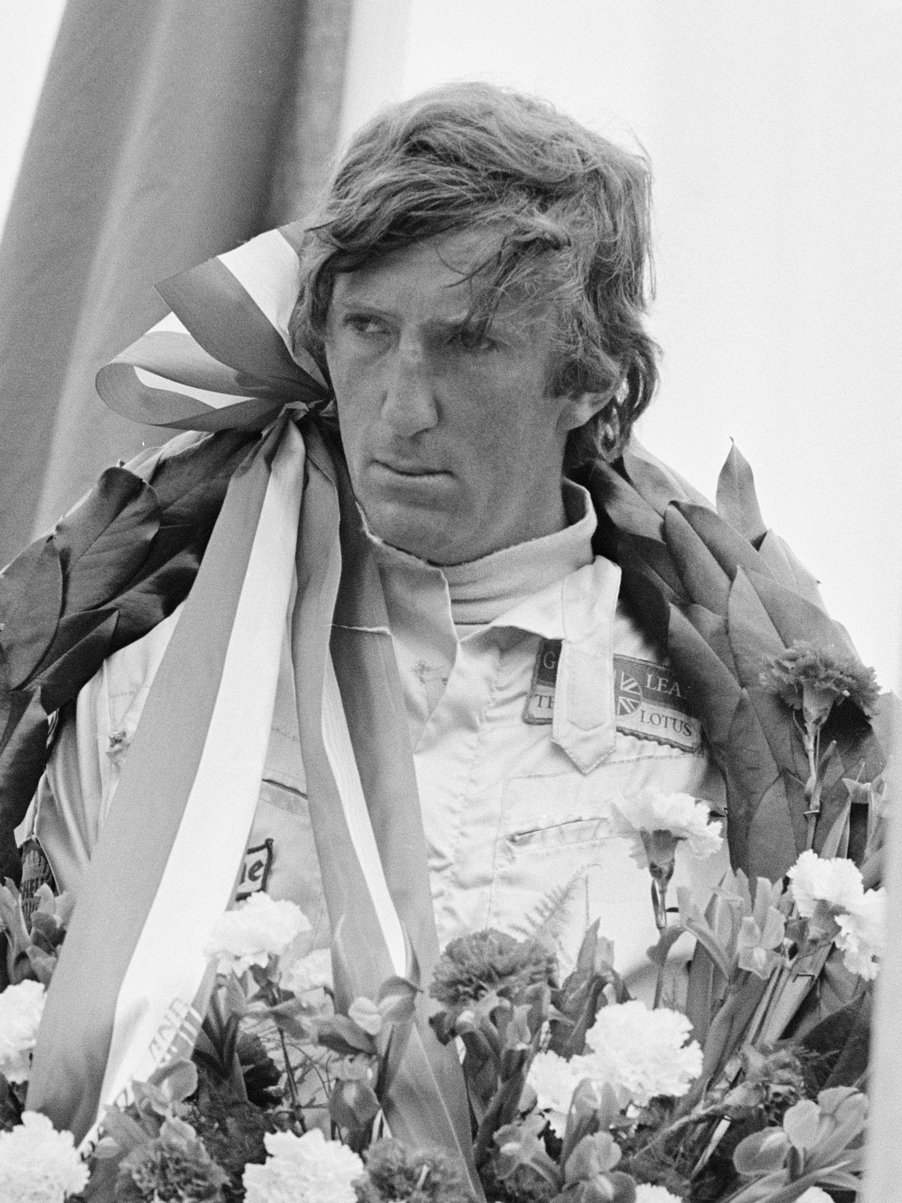 Grand Prix 1970 van Nederland voor Formule I wagens , Zandvoort; J. Rindt in krans, kop.